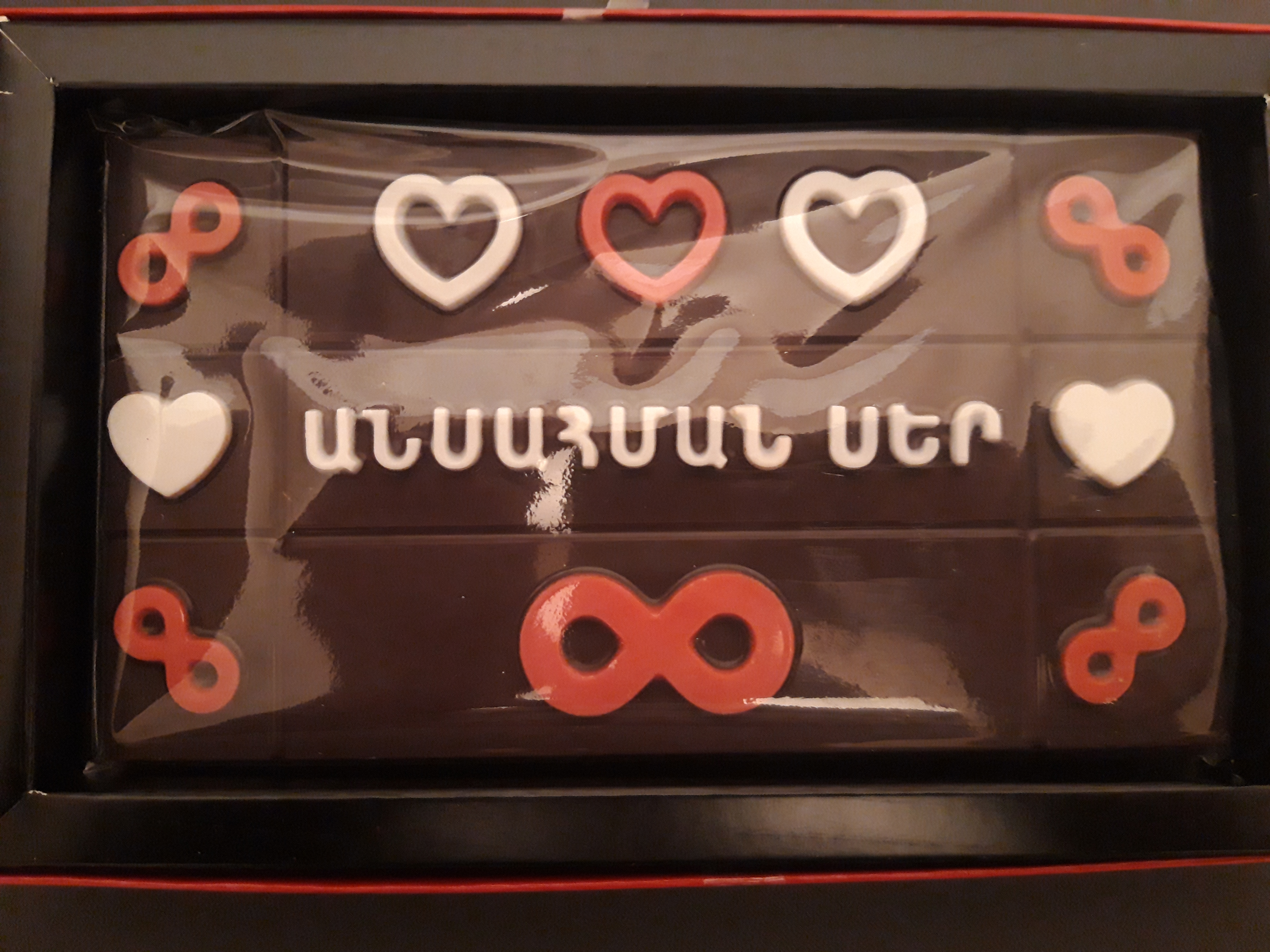 Շոկոլադի տեսքով վալենտինկա